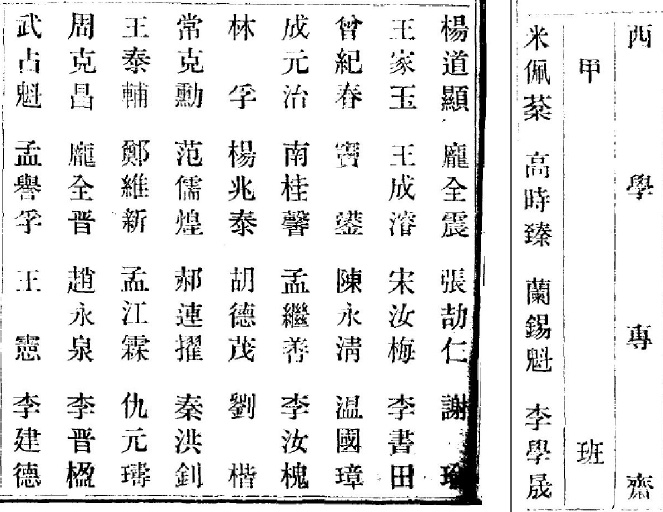 西學專齋學生